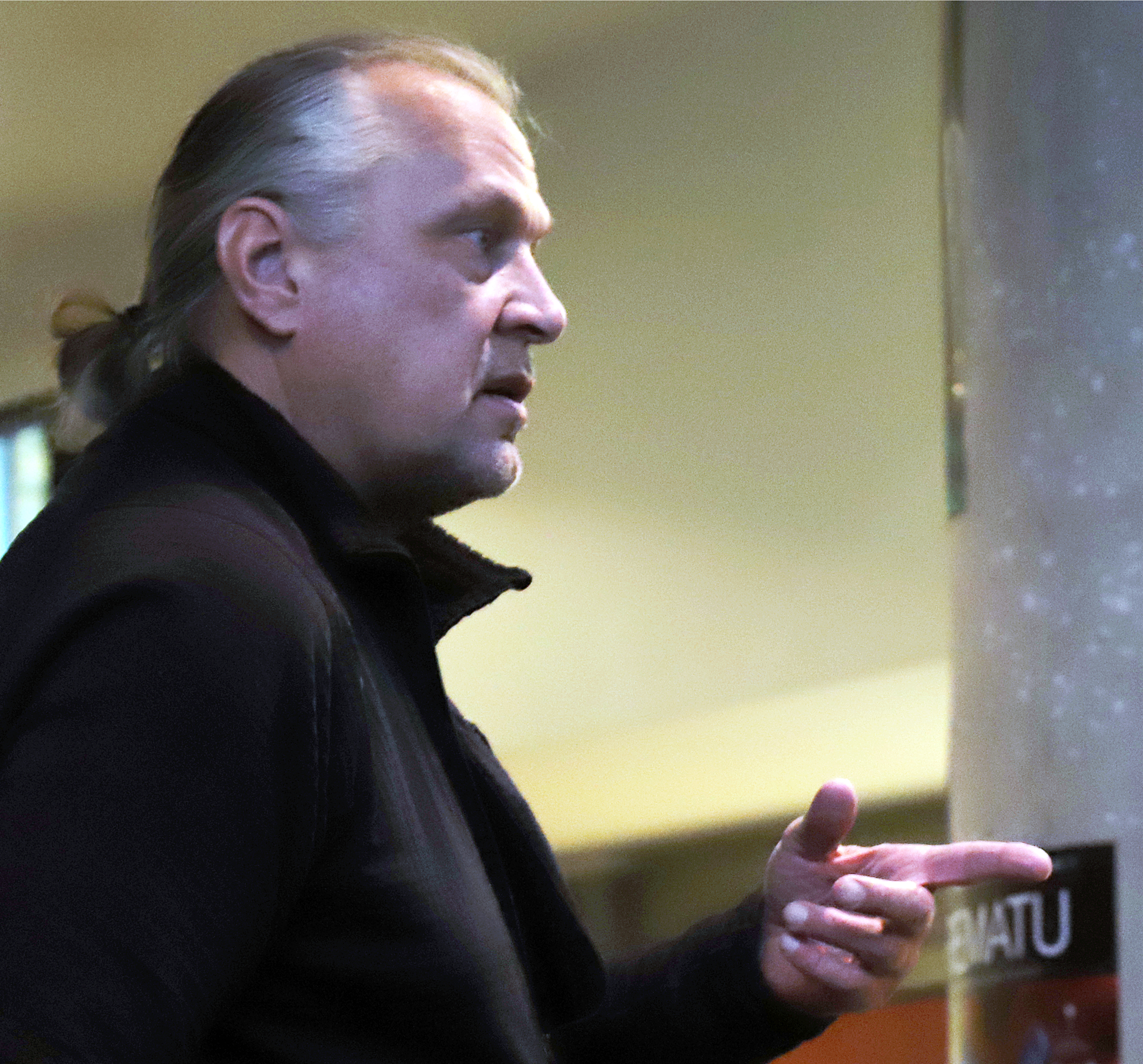 Toomas Urb, laulja ja endine näitleja. 2019